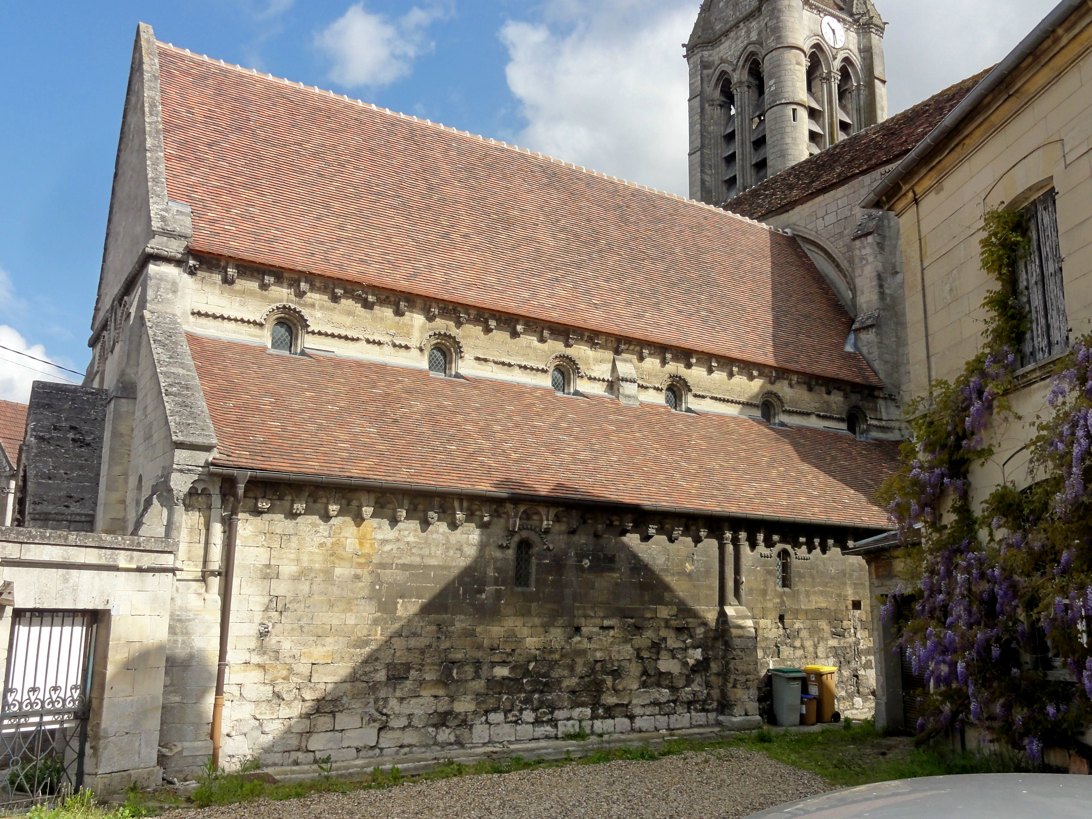 Vue depuis le sud-ouest.